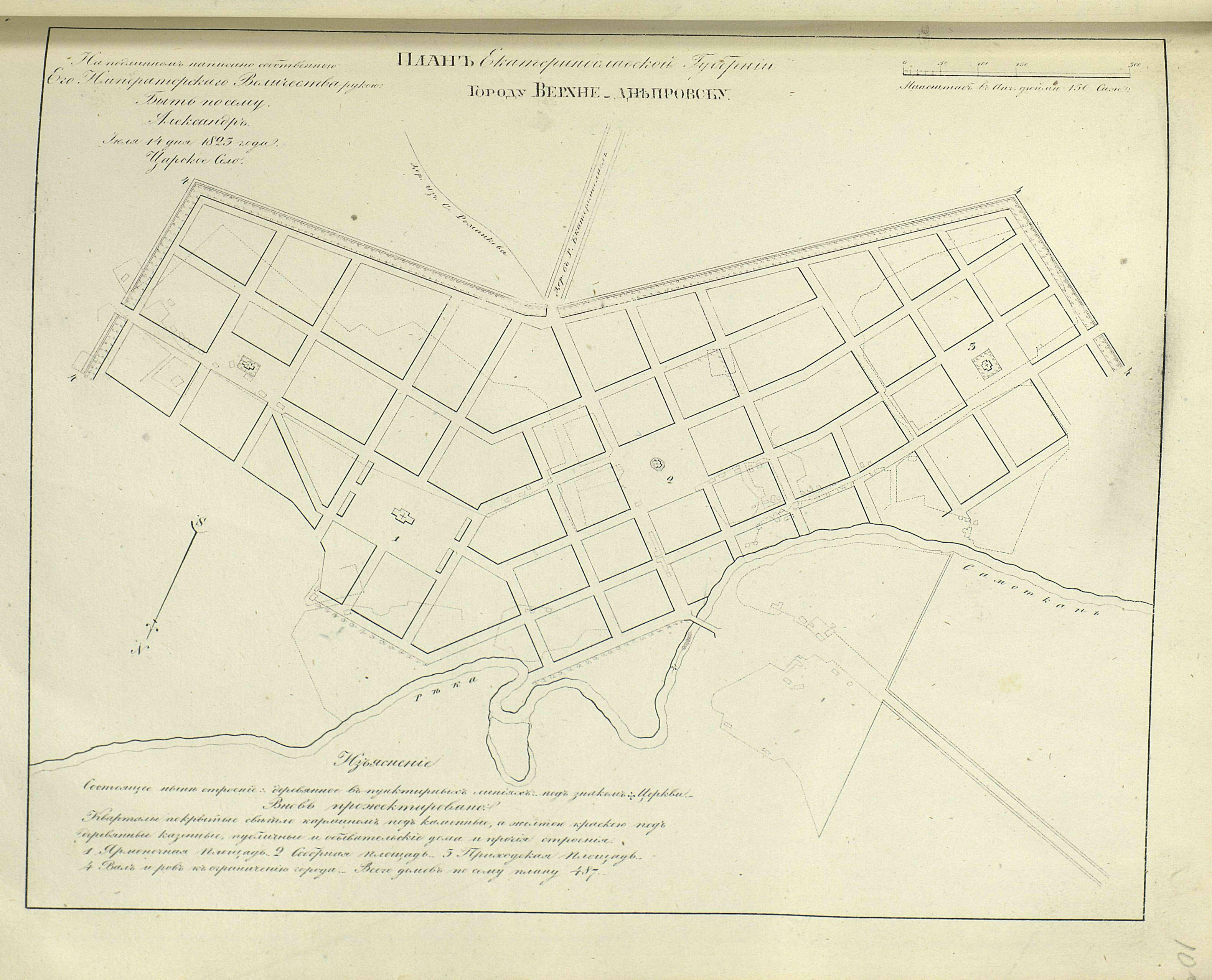 Полное Собрание Законов Российской Империи. Собрание первое. Книга чертежей и рисунков. (Планы городов).; 1839, Санктпетербургъ, Въ Типографіи II Отделенія Собственной Е. И. В. Канцеляріи.